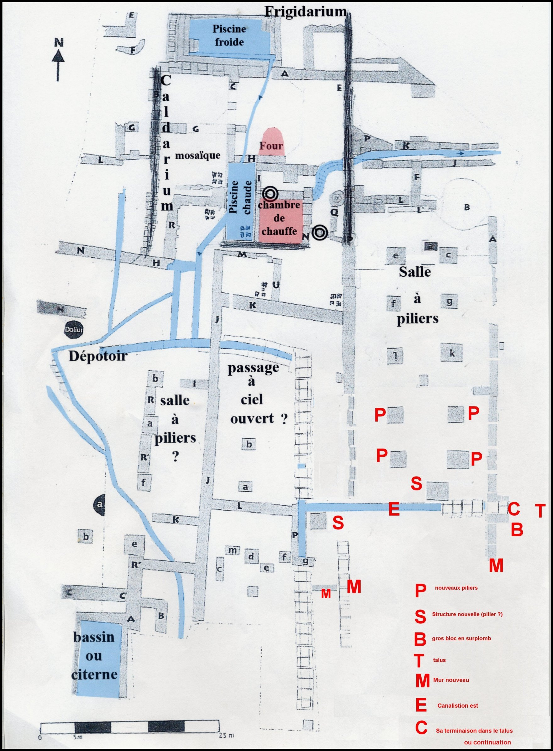 Plan d'ensemble actuel du site gallo-romain de Vivios (Lespignan, ouest de l' Hérault). Le réseau des canalisations est en bleu (M.Clavel-Lévêque). Les parties rajoutées au sud-est et indiquées en rouge sont de découverte récente (A.Lopez,2018).